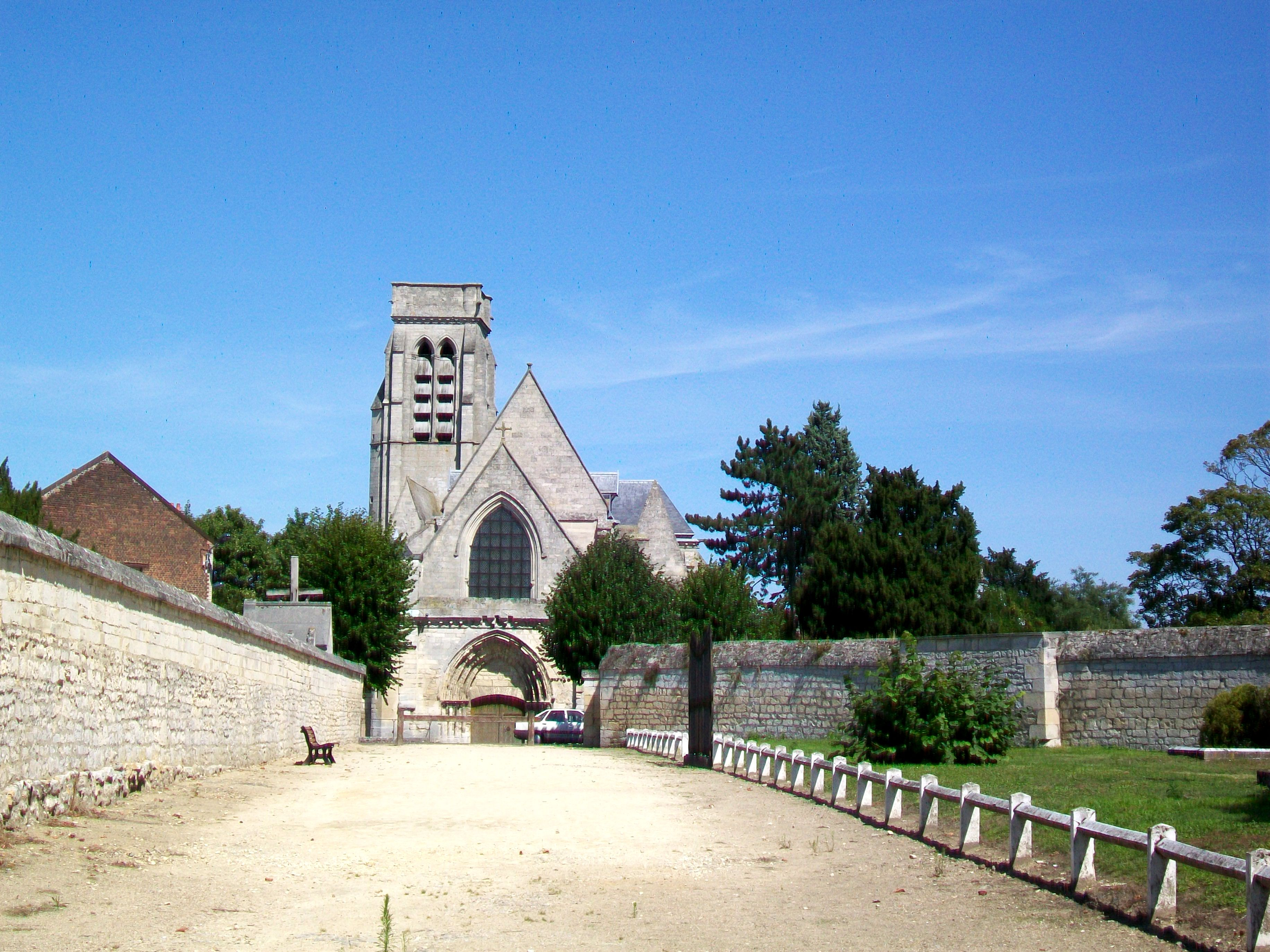 Le chemin vers l'église. A droite, le domaine du château, inaccessible au public ; à gauche, le cimetière.